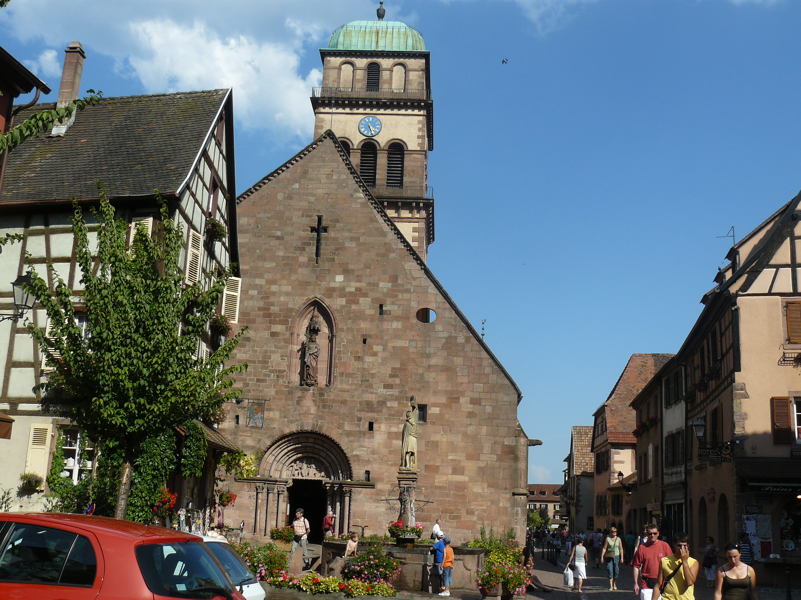 Église Sainte Croix